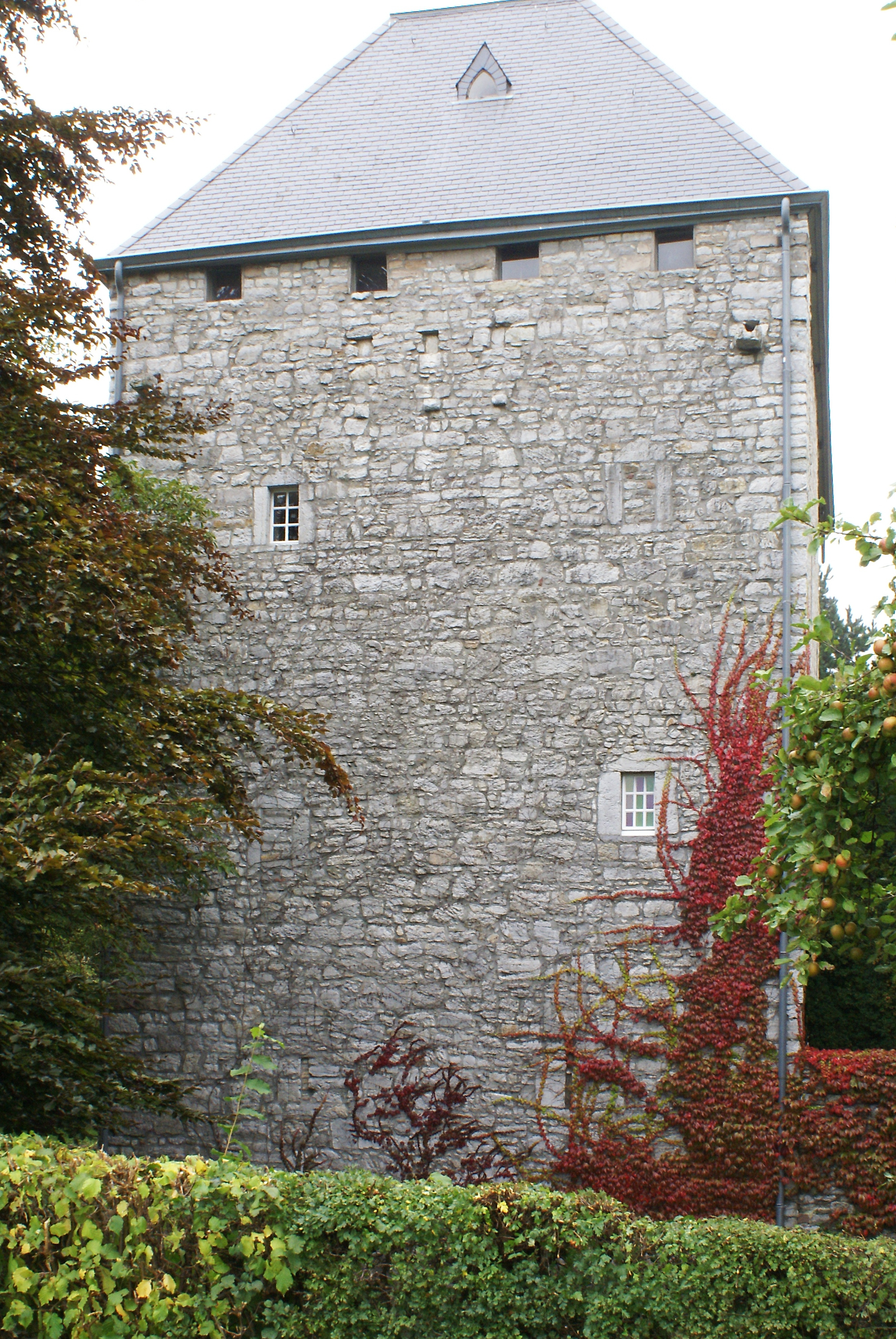 Haus Raeren in Raeren Belgien